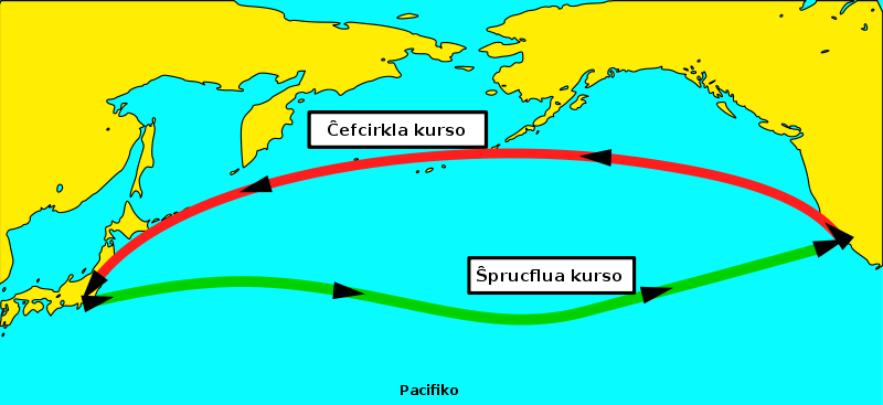 Ŝprucflua kaj ĉefcirkla kursoj aŭ flugvojoj.